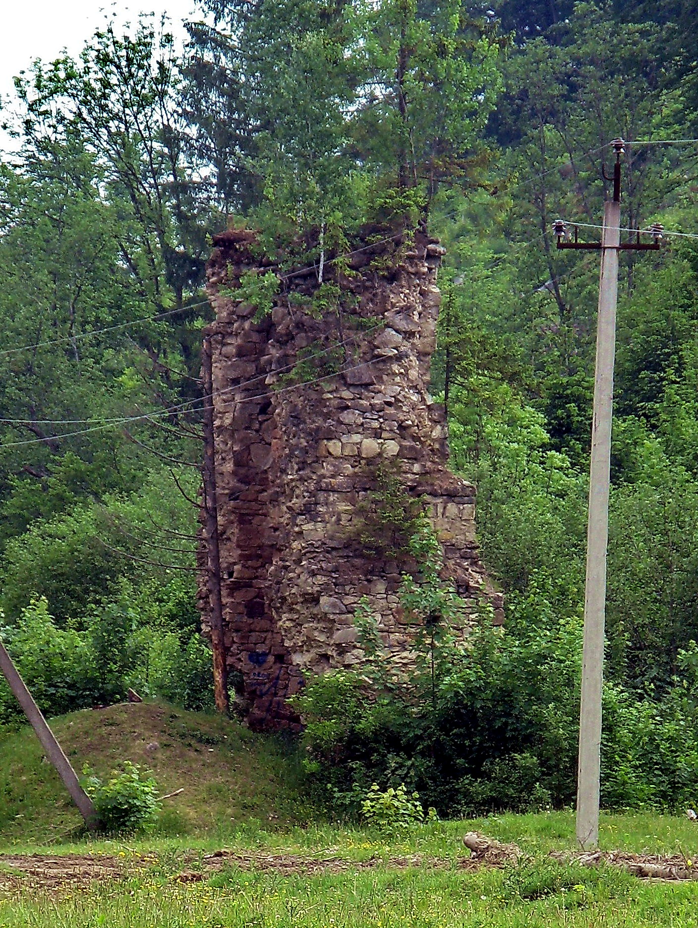 Рештки залізоплавильної печі., с. Мигове, ур. Майдан